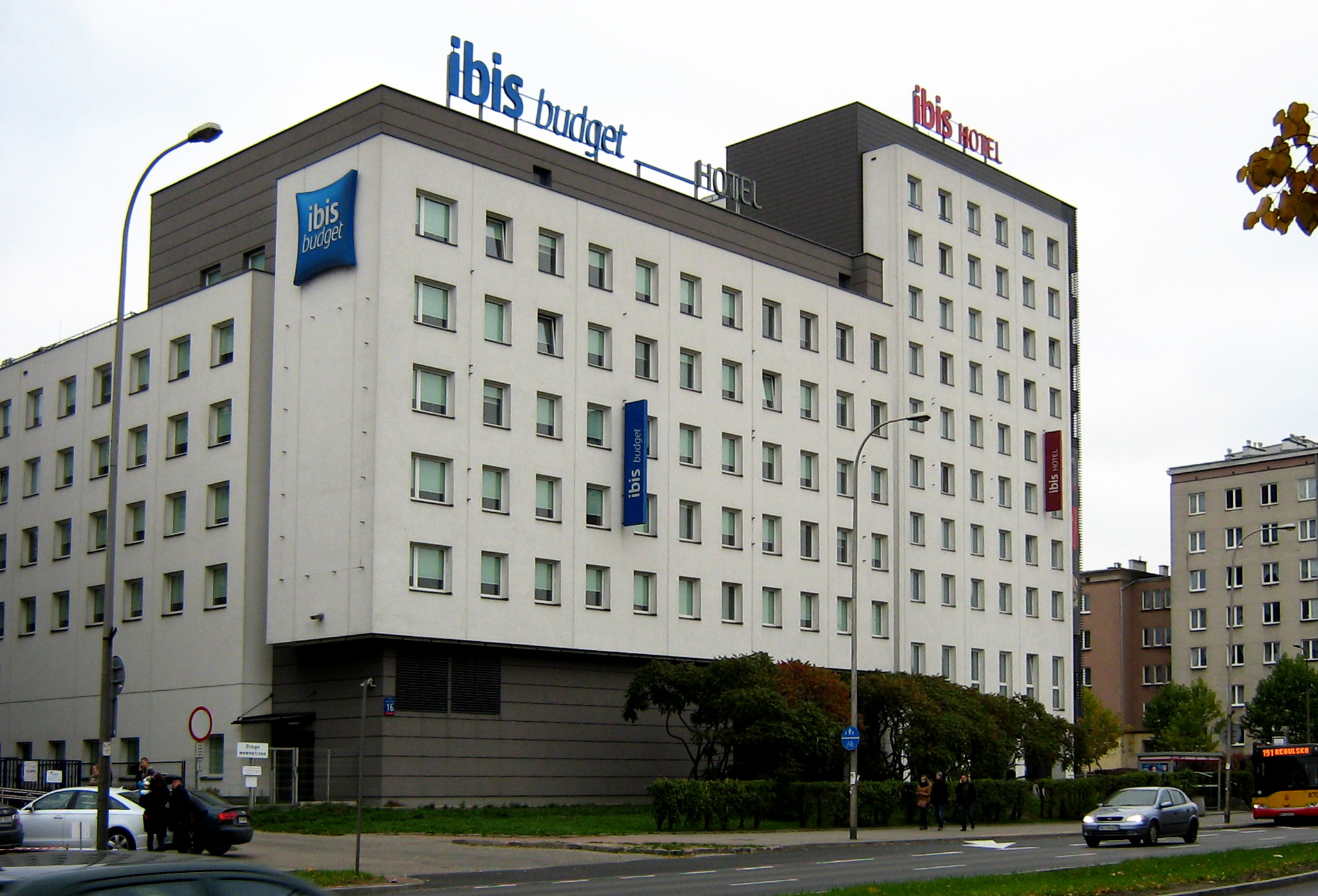 Ibis Warszawa Reduta i Ibis Budget na rogu ul. Bitwy Warszawskiej 1920 r. i Szczęśliwickiej w Warszawie